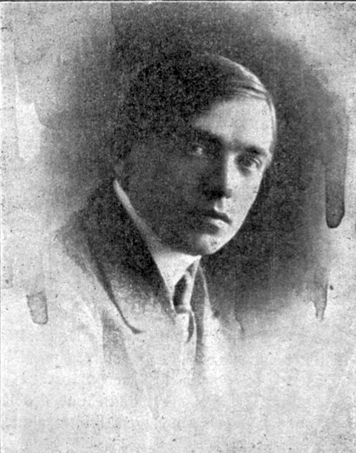 Liviu Rebreanu (n. 27 noiembrie 1885, Târlișua, Austro-Ungaria – d. 1 septembrie 1944,[1][3][2] Valea Mare, România) a fost un prozator și dramaturg român, membru titular al Academiei Române.